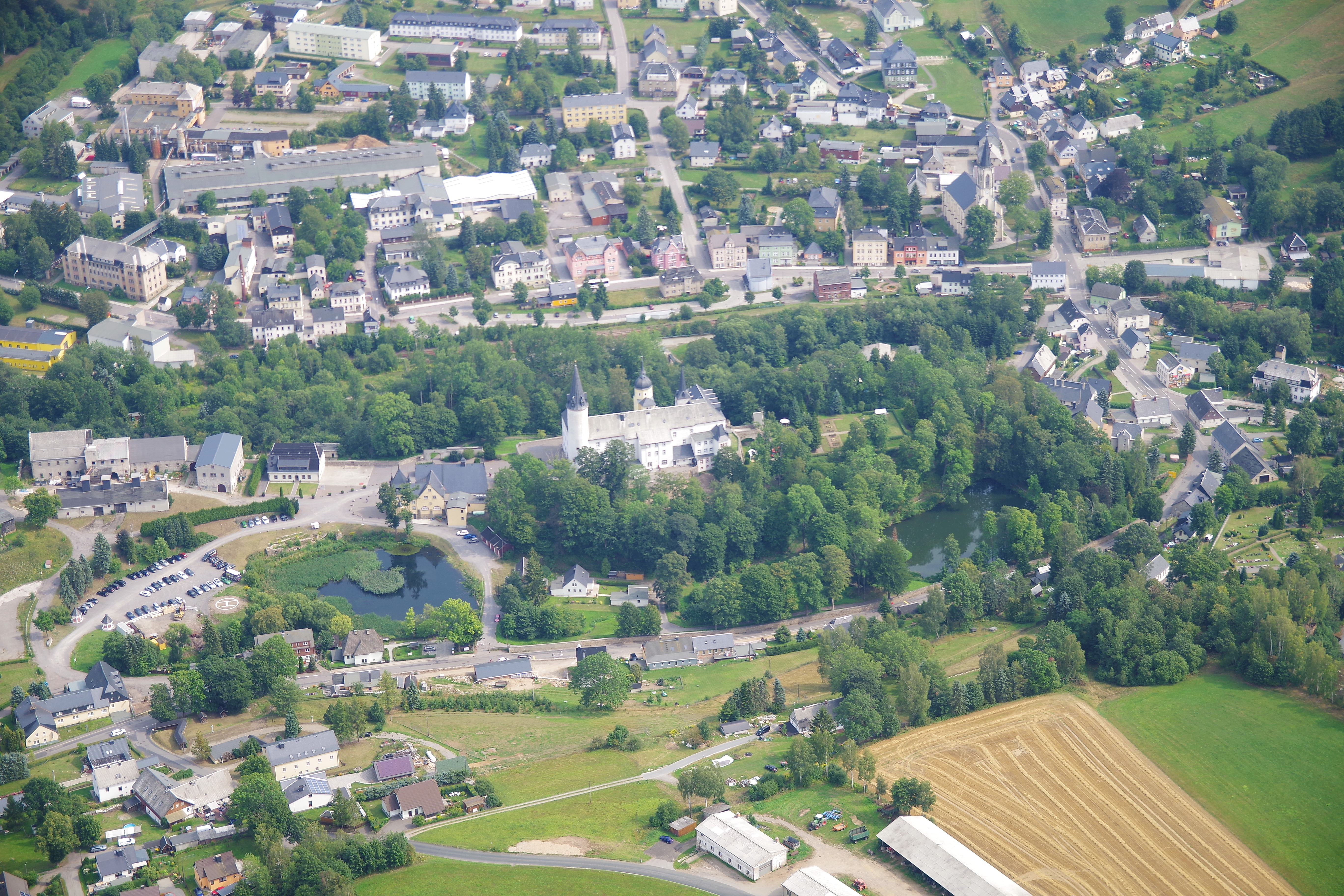 Neuhausen im Erzgebirge